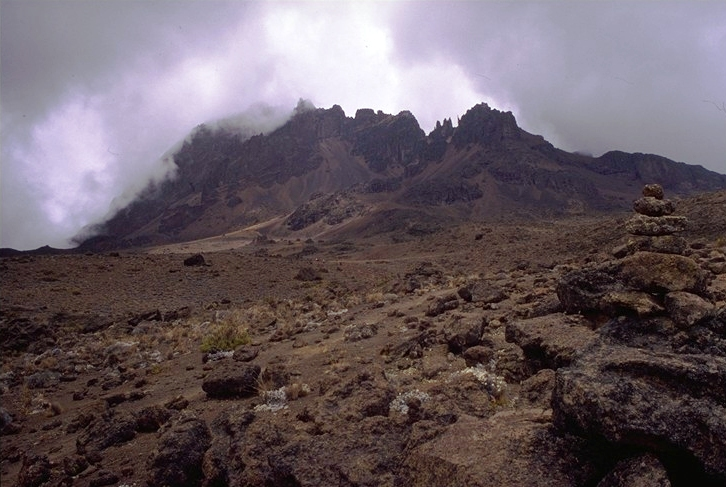 Mawenzi peak - Kilimanjaro National Park - Tanzania